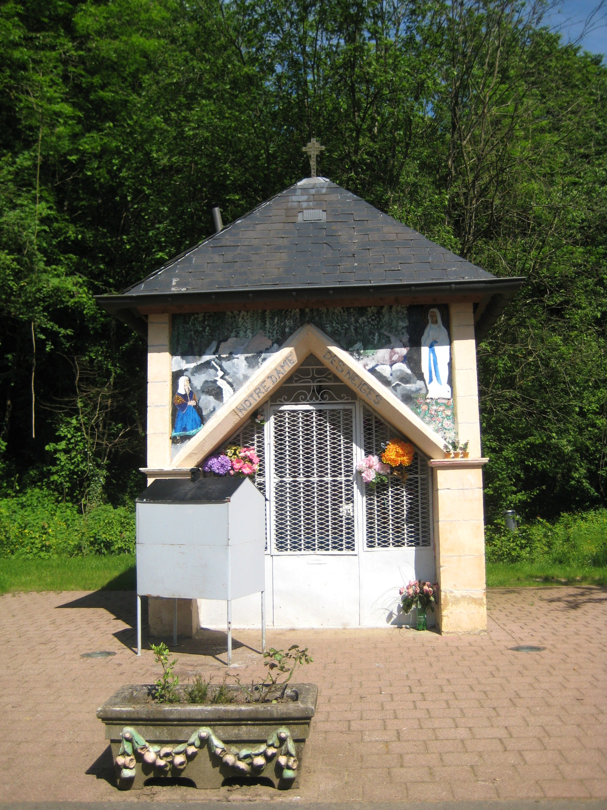 Description oratoire Notre Dame des Neiges de Neufchef Date22 May 2009Sourcemon appareil photoAuthorAimelaime oratoire Notre Dame des Neiges de Neufchef